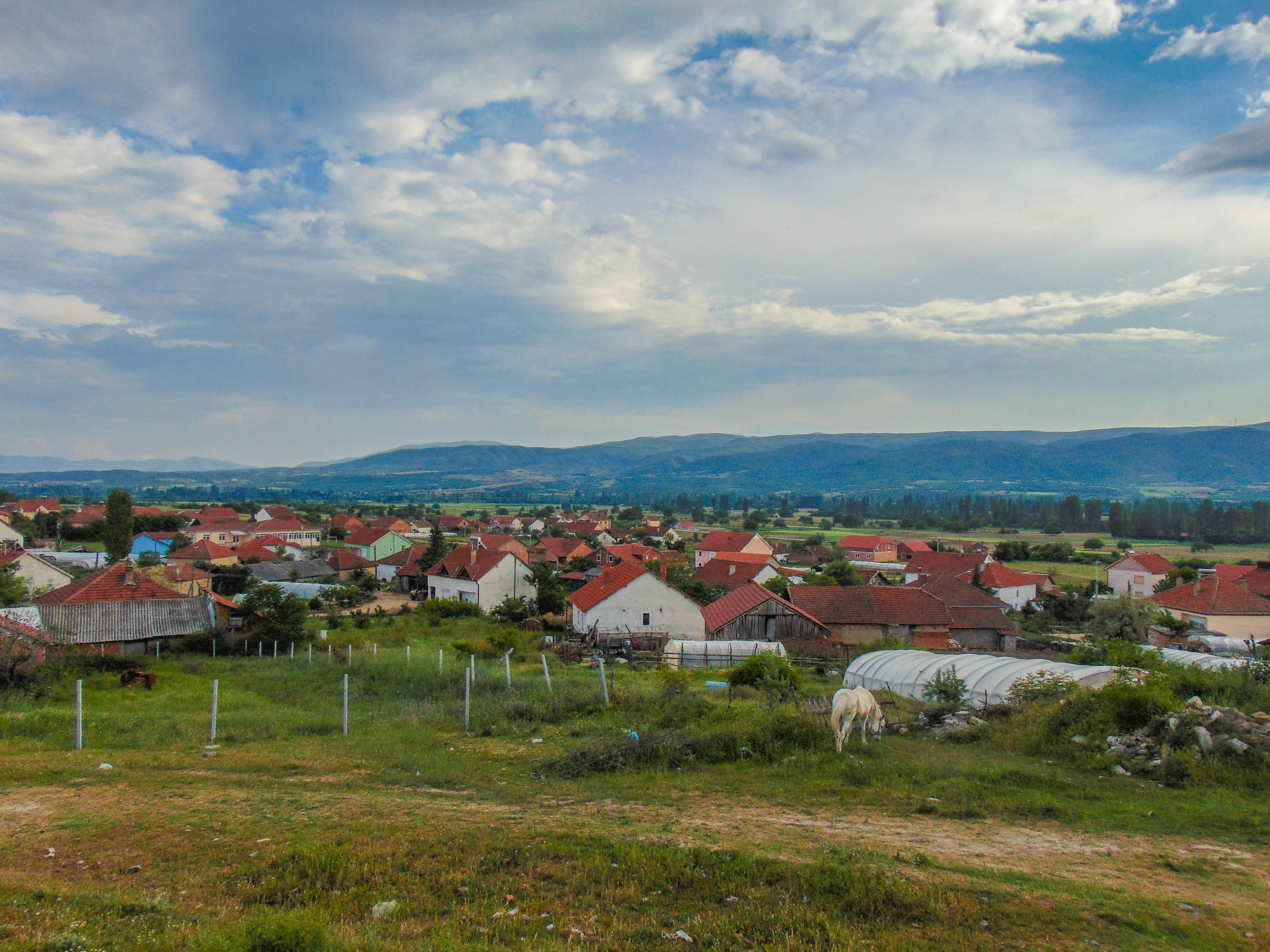 Јаргулица, Општина Радовиш